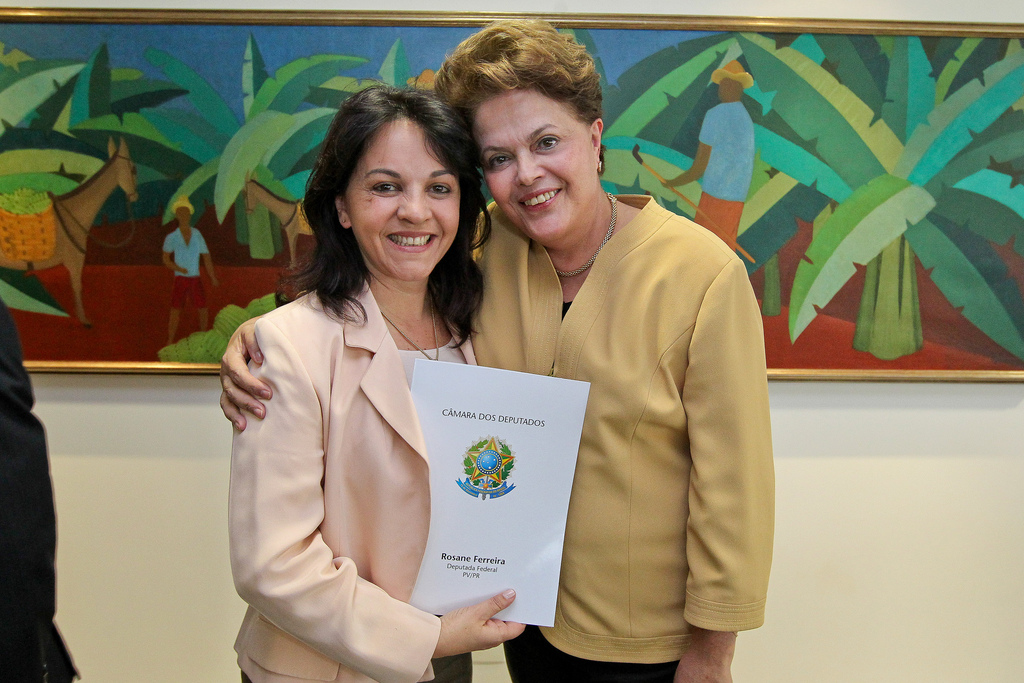 Rosane Ferreira cobra apoio de Dilma Rousseff a favor das 30 horas da enfermagem